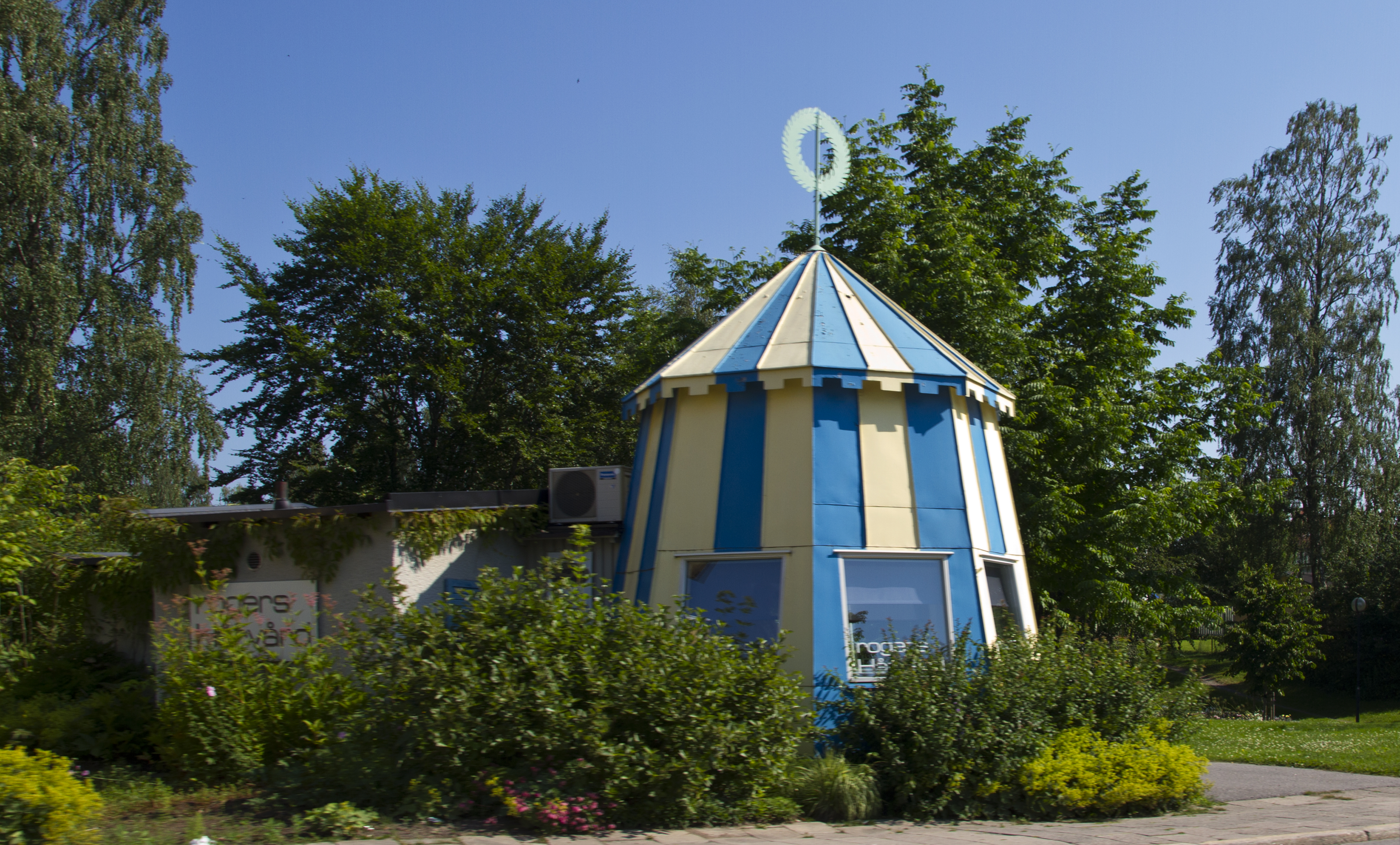 Bohult, Karlskoga, Sweden